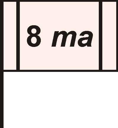 Іконка - прапор 8-ї танкової армії